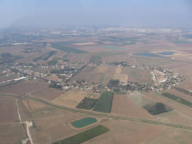 מושב בית גמליאל.תמונה מדרום.